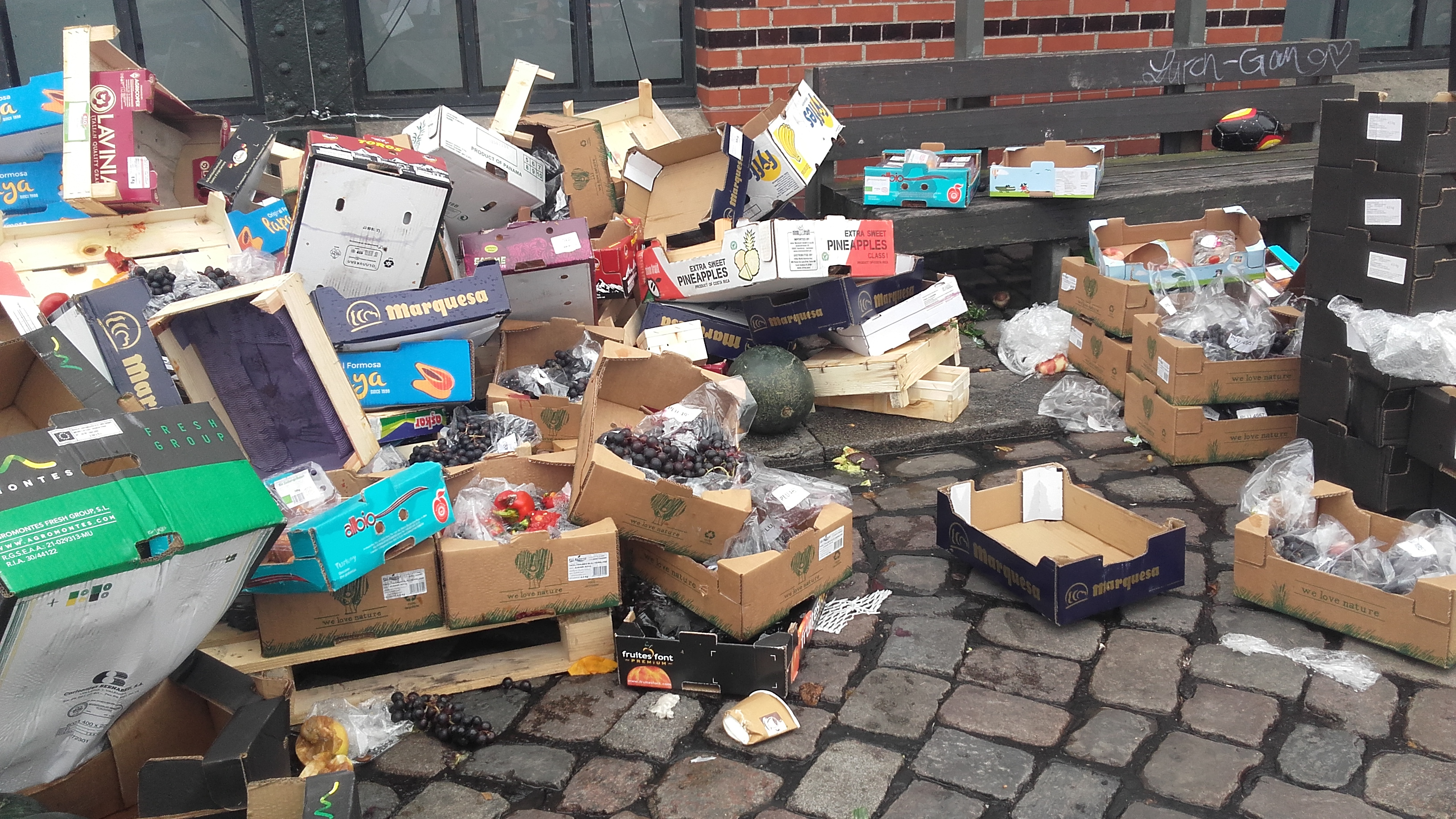 Abfall am Hamburger Fischmarkt nach Makrtzeit. Zum Teil befinden sich noch genießbare Lebensmittel unter dem Abfall.